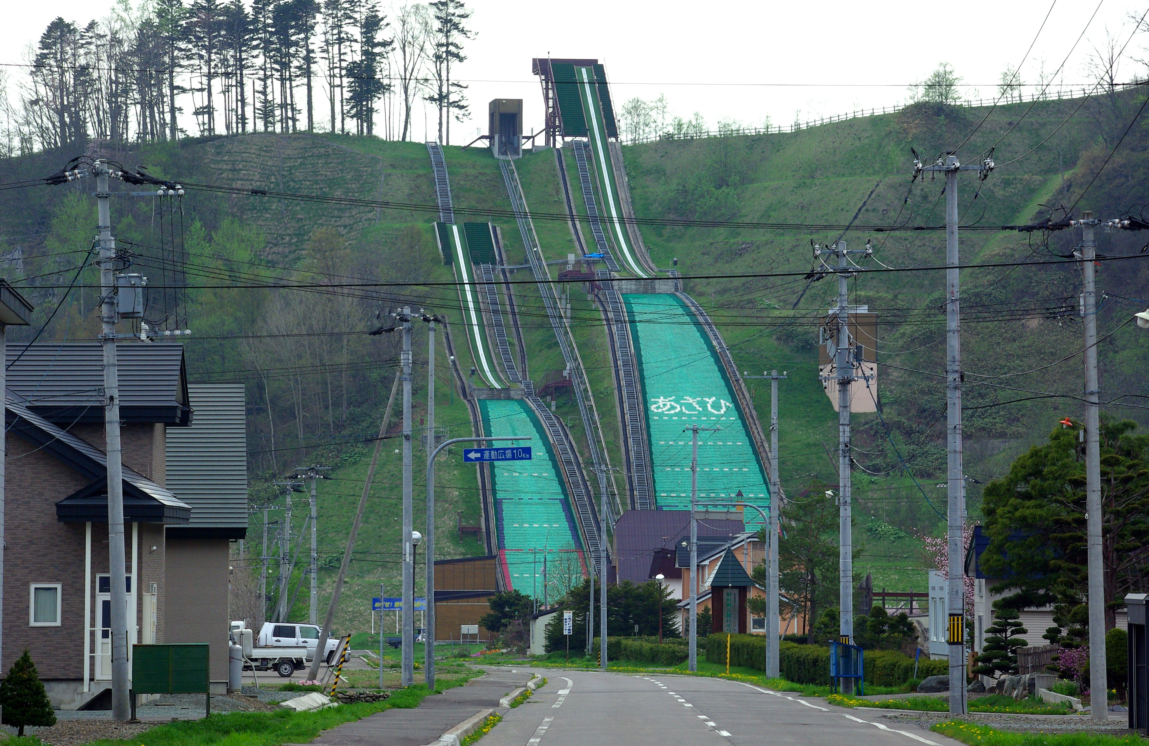 三望台シャンツェ01